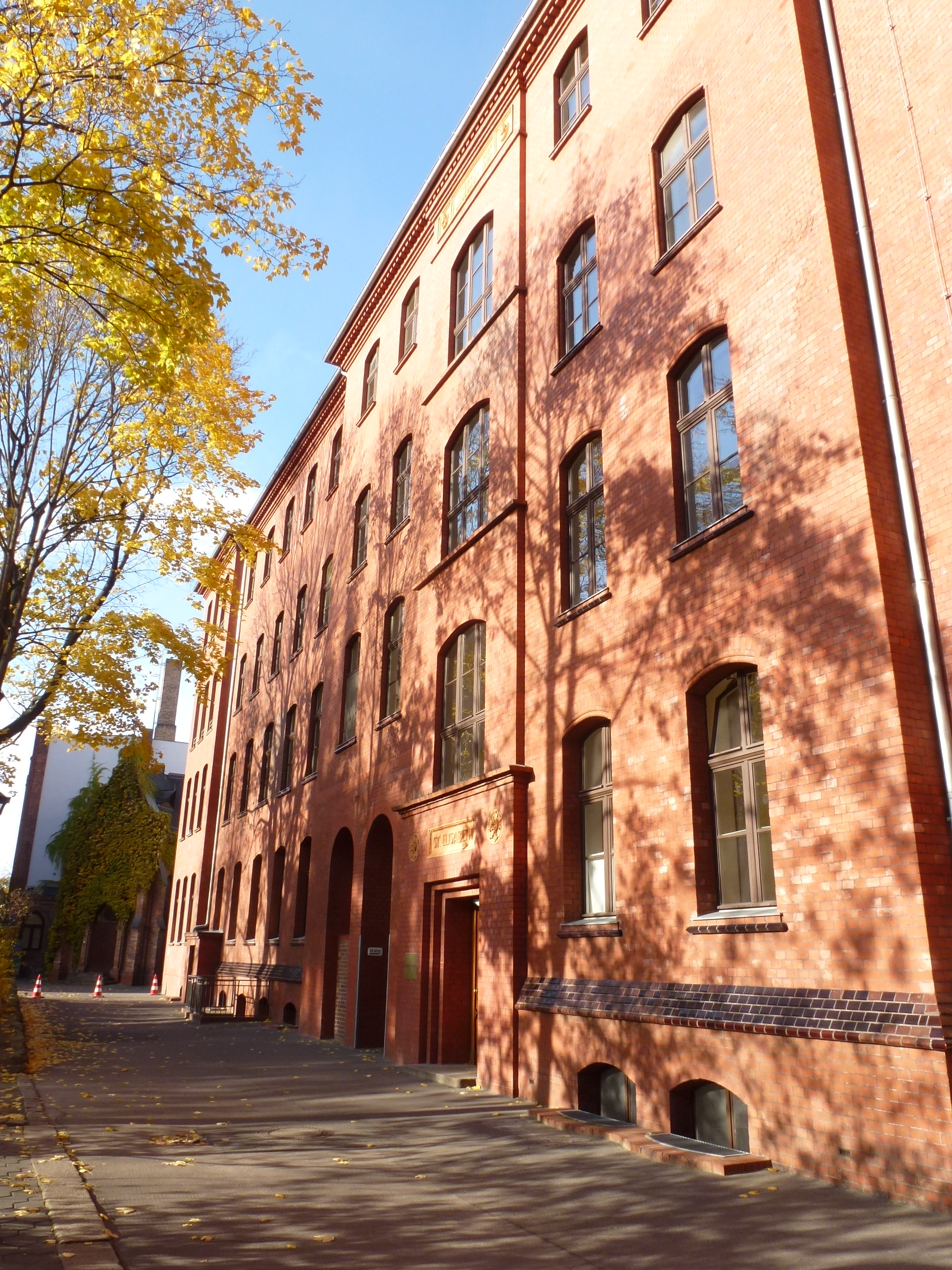 Mitte Große Hamburger Straße St. Hedwig-Krankenhaus